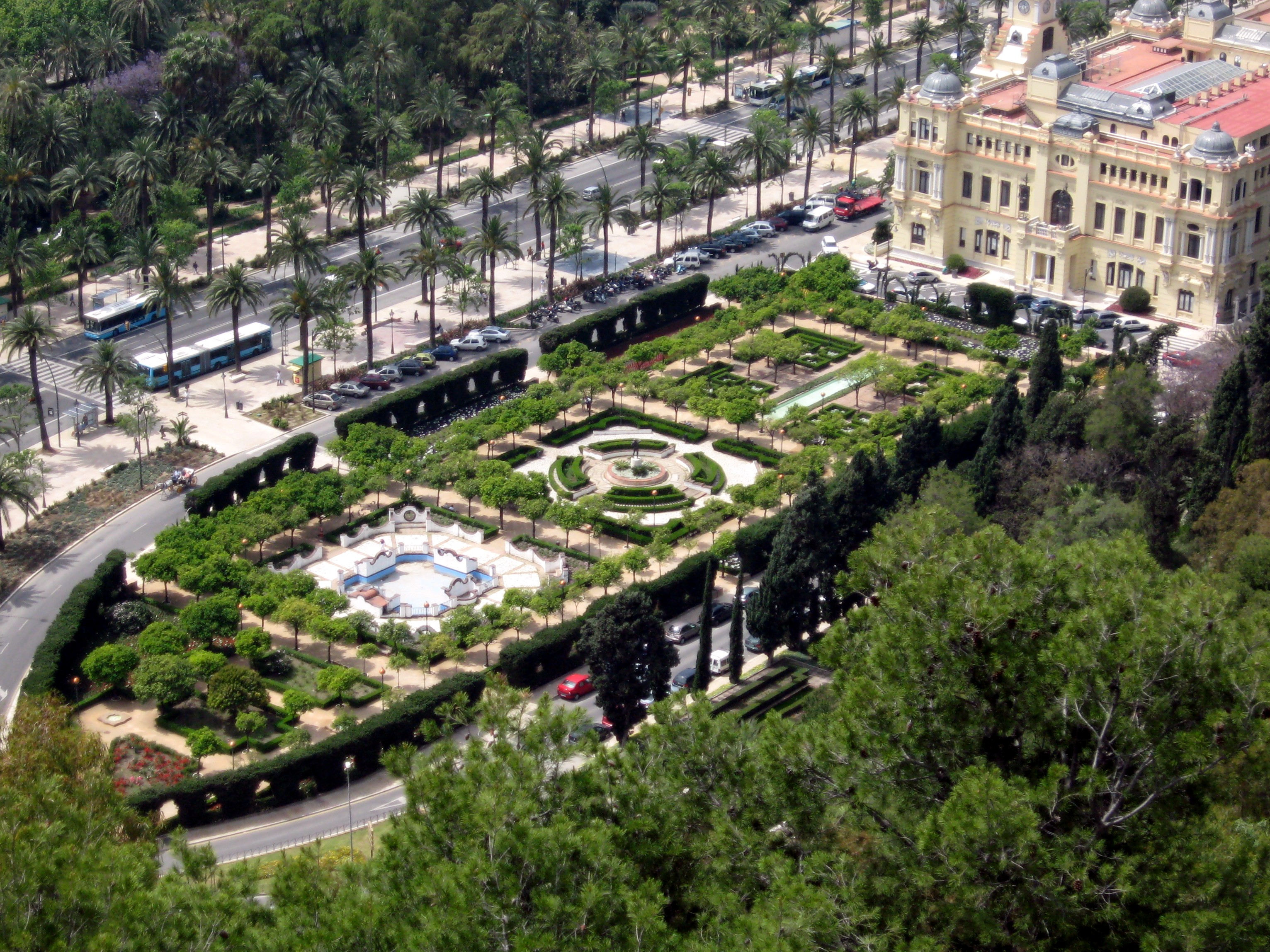 Pedro-Luis-Alonso-Gärten (Jardines de Pedro Luis Alonso) am Rathaus von Málaga, Andalusien, Spanien